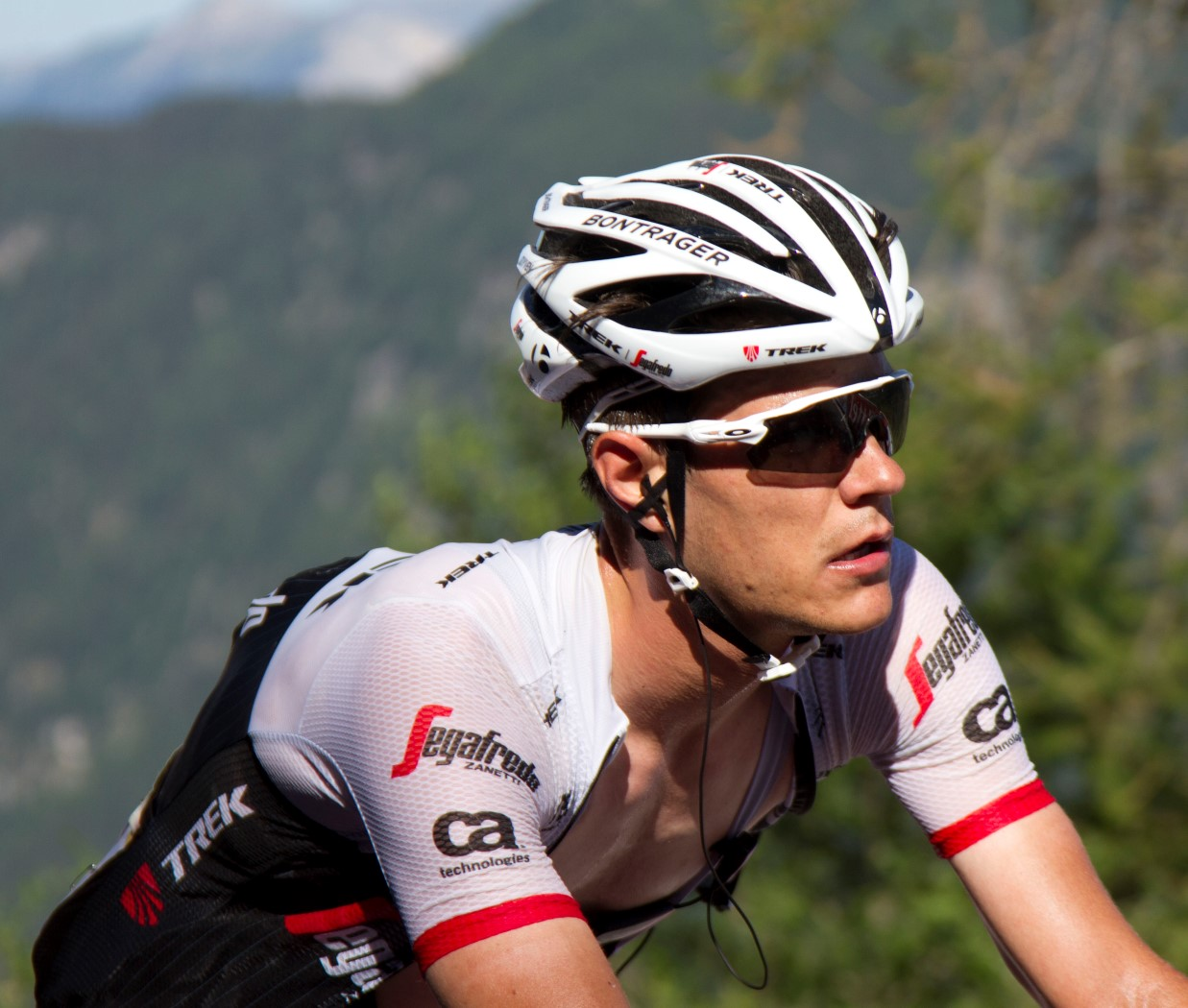 315 stuyven